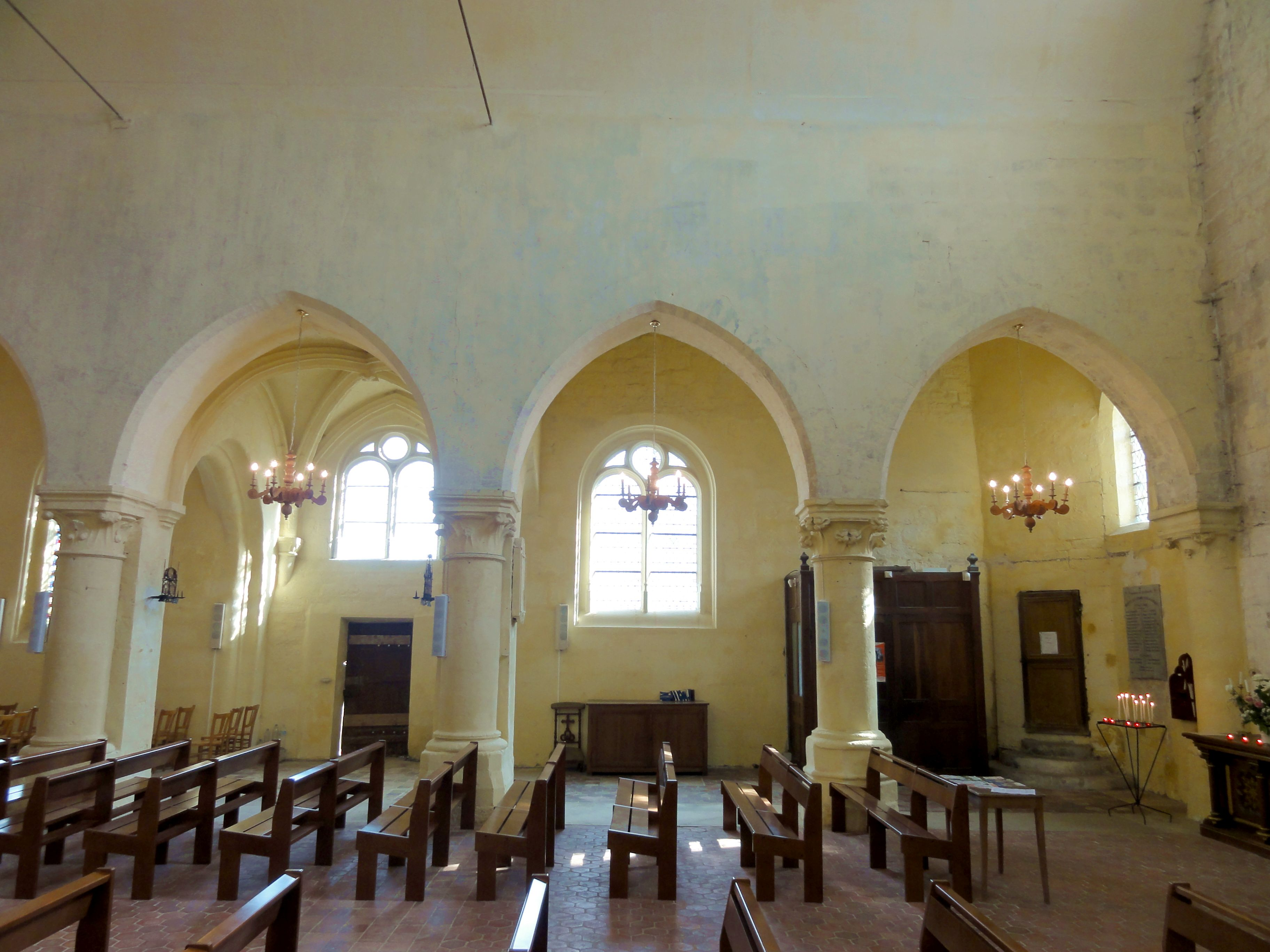 Nef, grandes arcades du sud (3, 2e et 1ère).